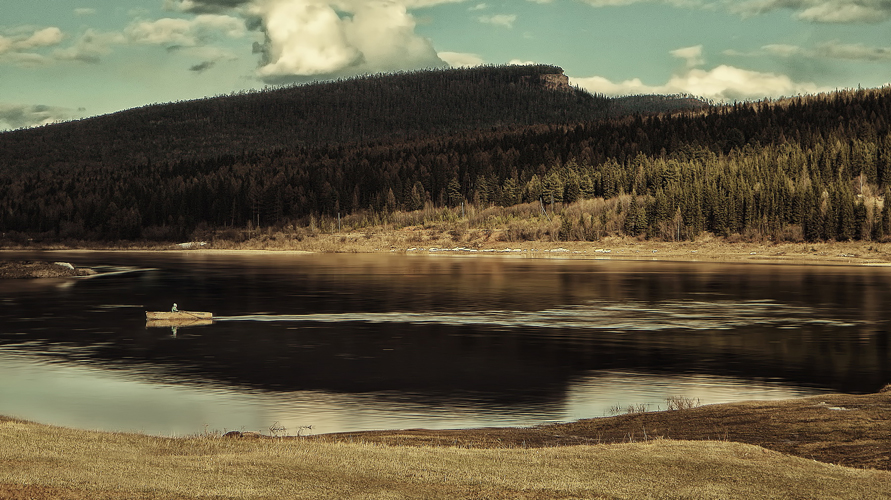 Заводь Домашнего острова в осенних тонах.